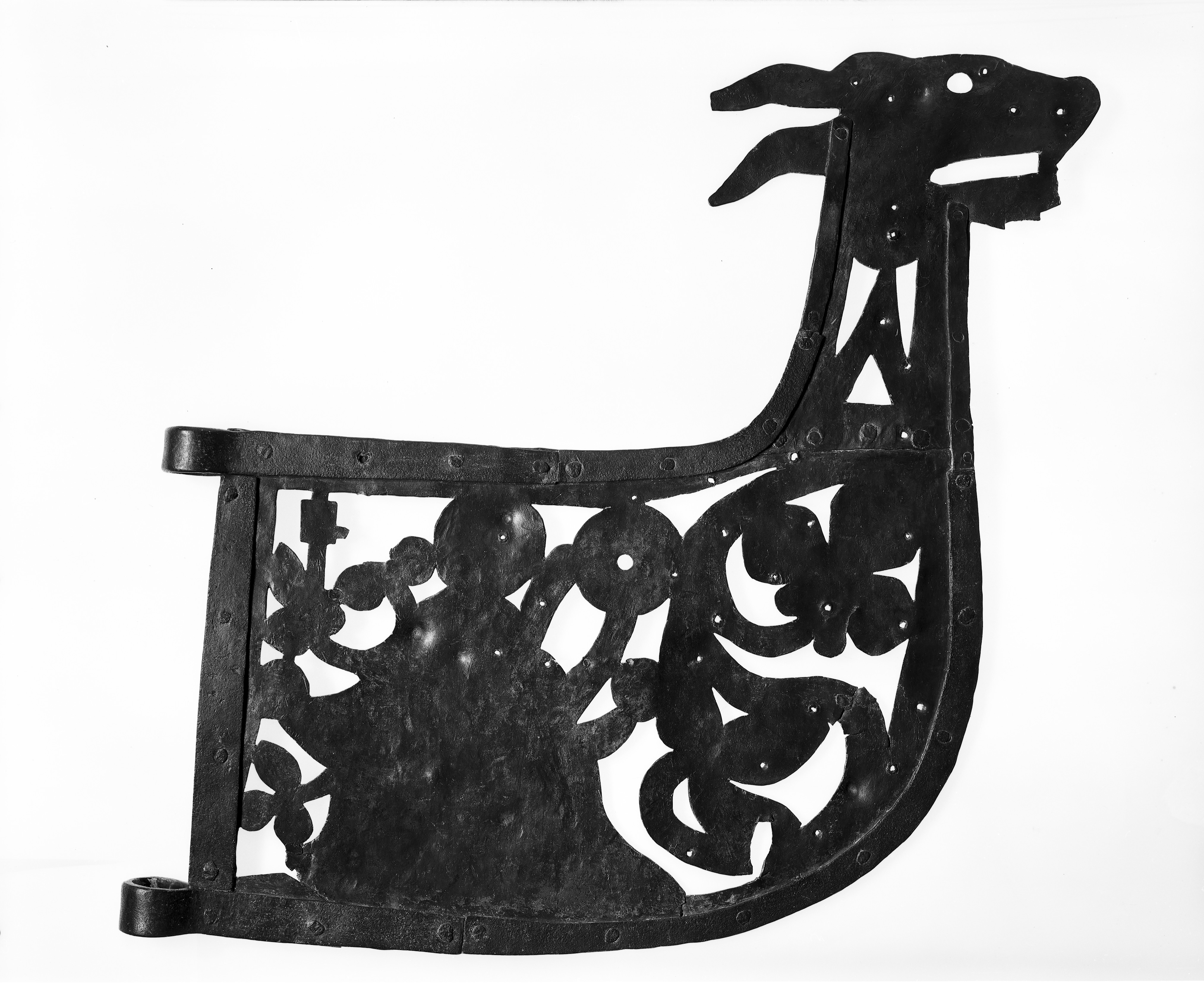 Norderhov weather vane © 2016 Kulturhistorisk museum, UiO / CC BY-SA 4.0